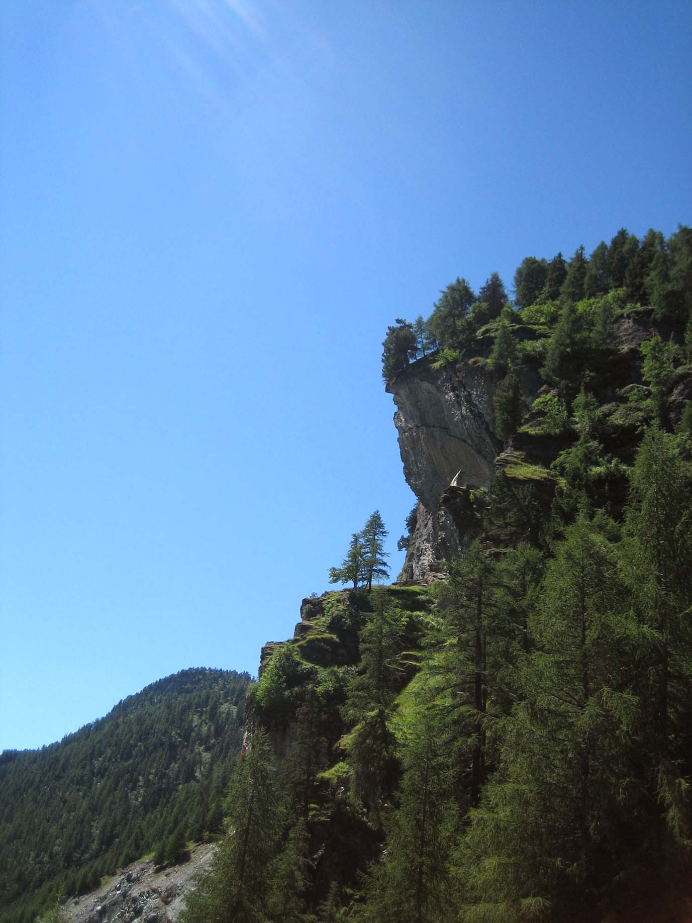 Geländevorsprung